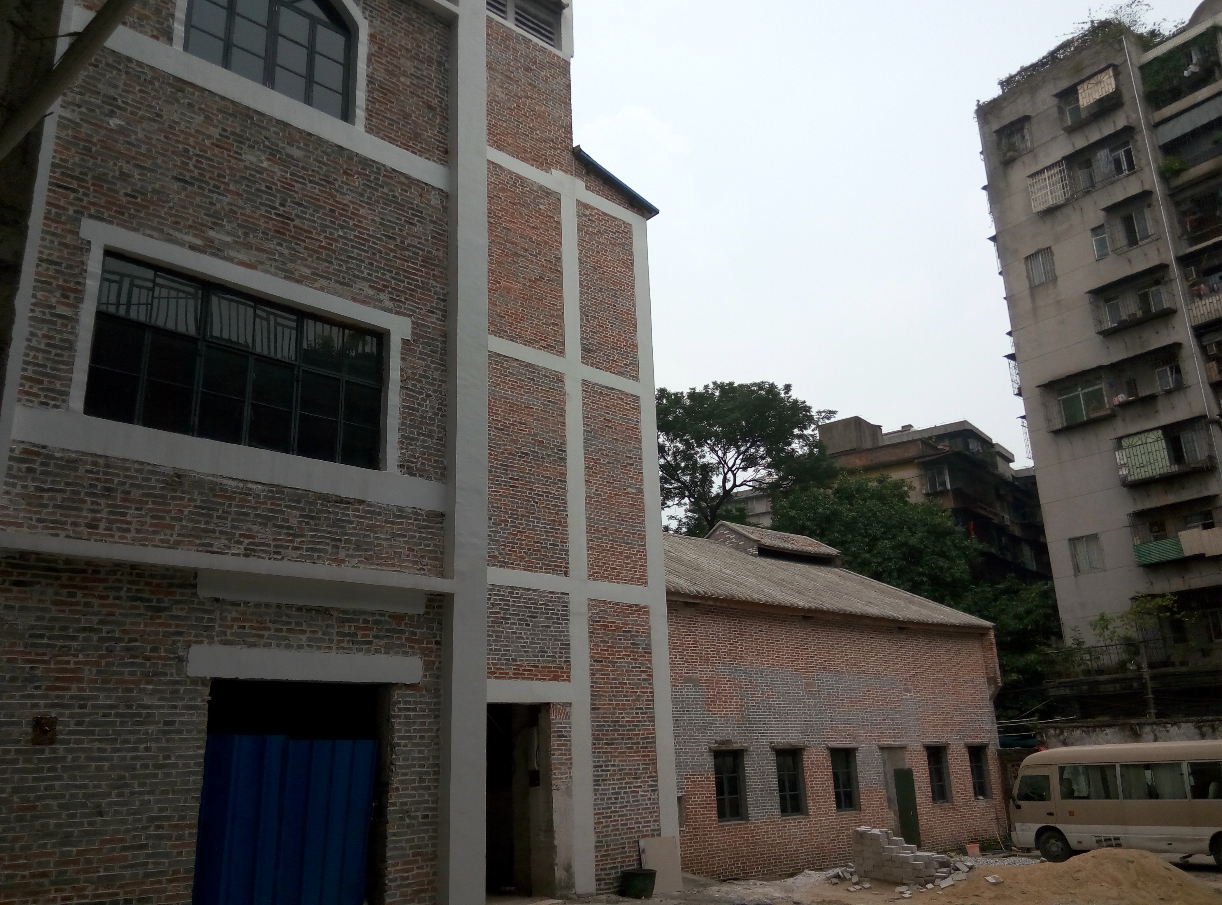 粵語: 鳳凰崗 誠志倉新樣